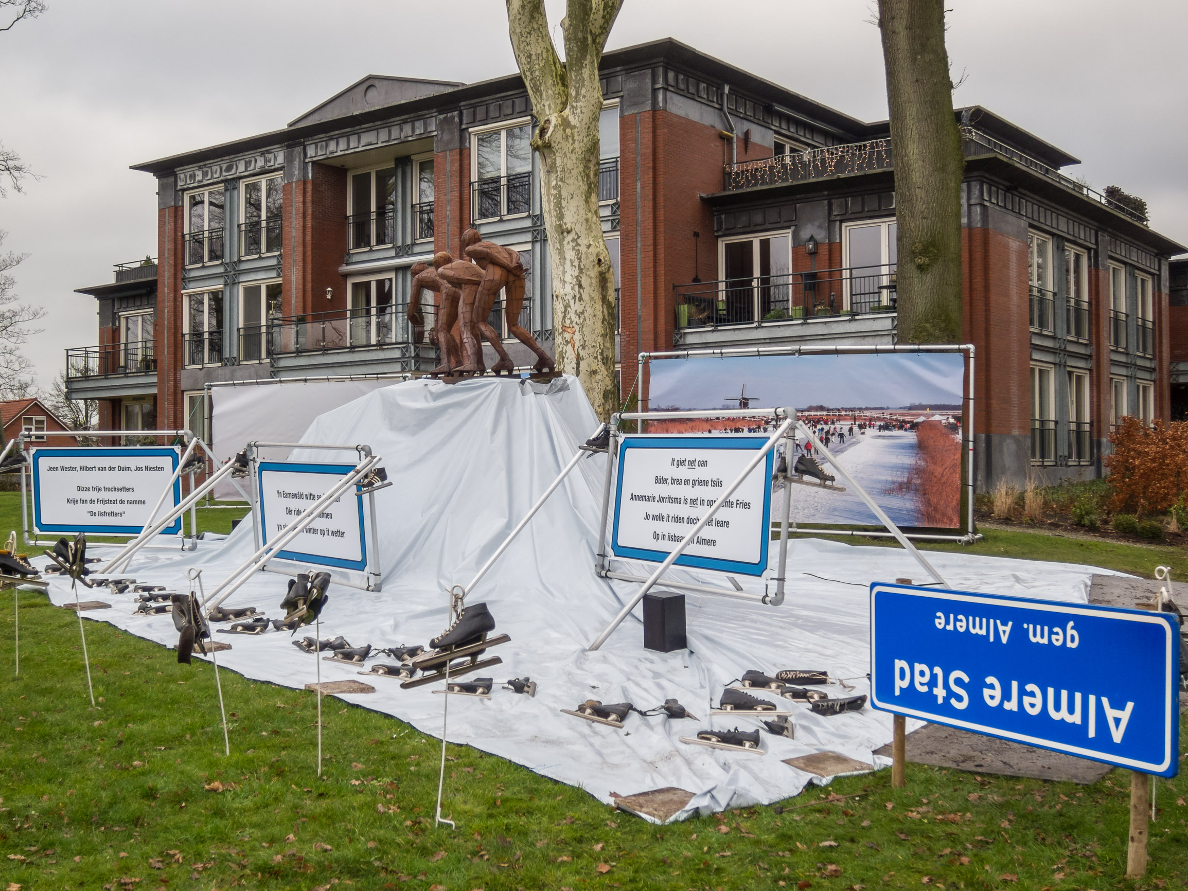 stunt oudejaarsvereniging Frijsteat De Folgeren 2013-2014